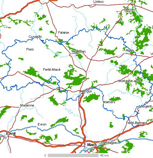 Carte du département de l'Orne Légende